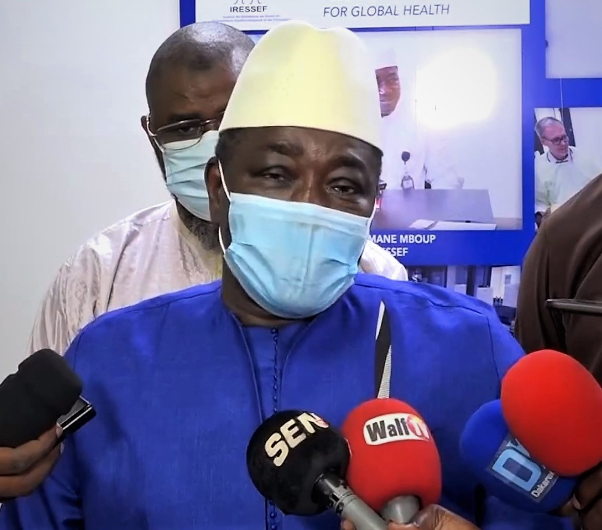 Pr Souleymane Mboup: "L'Iressef a fait 13 000 tests Covid (...) il y a lieu de s'inquiéter..." Dakaractu, la chaine d'information en ligne! Abonnez-vous à notre chaîne sur YouTube : Rejoignez nous sur Facebook: Suivez nous sur Twitter